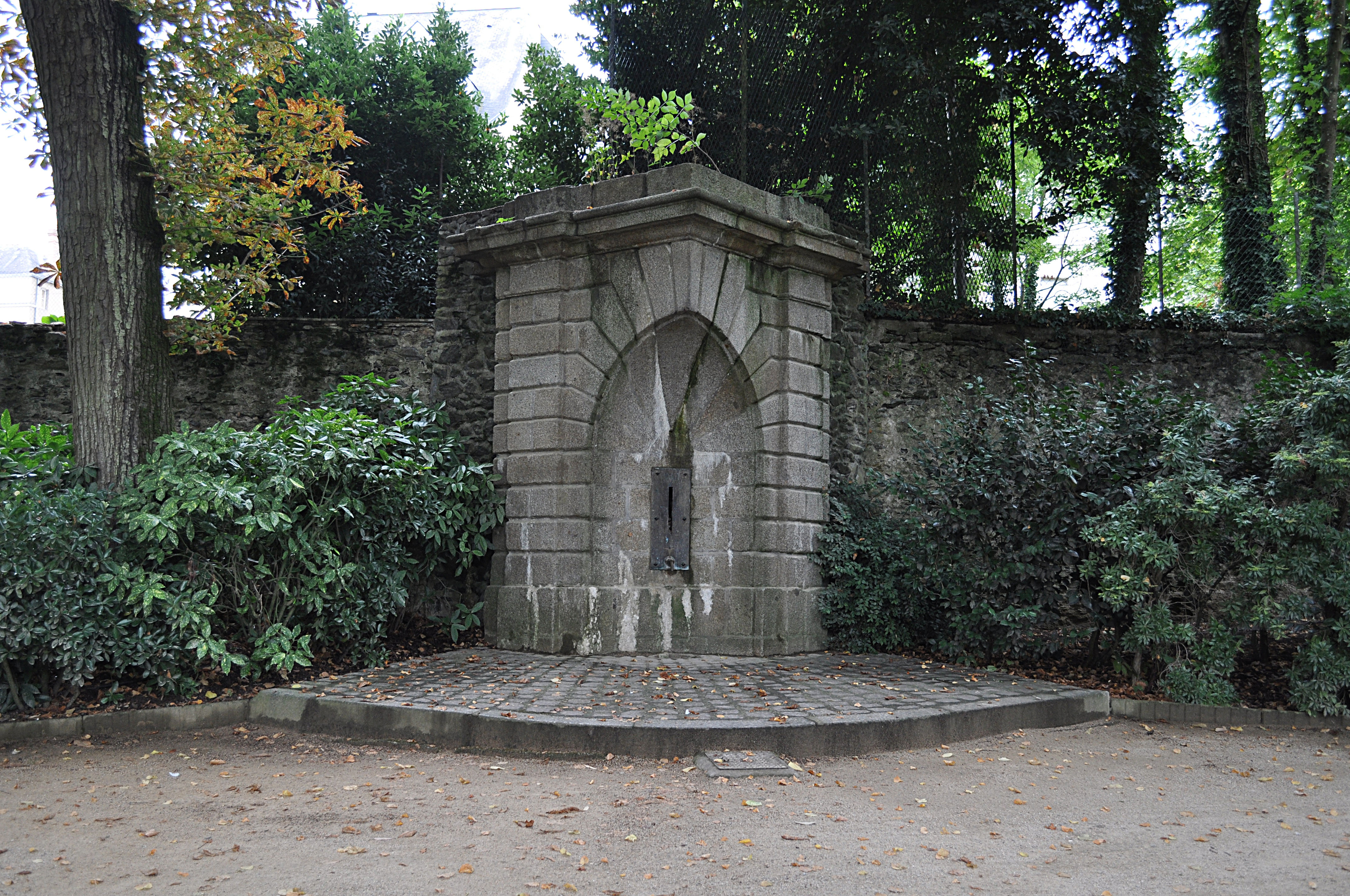 Fontaine dite des Trois Croix ou du Puits-Rocher à Laval. Autrefois située à l'angle de la rue de Paradis et de la rue du Hameau, elle a été transférée dans le jardin de la Perrine en 1936. .